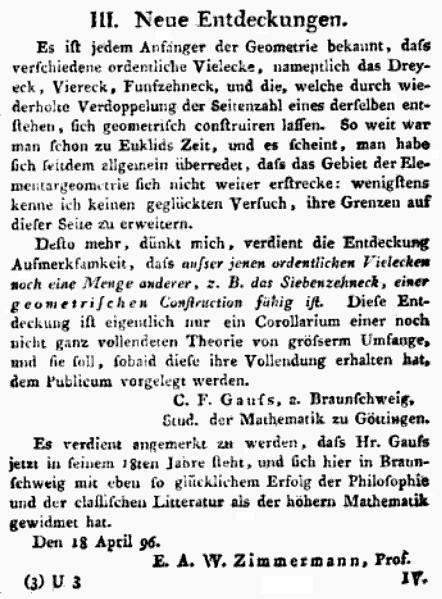 Die 1796 durch Carl-Friedrich Gauß erfolgte Mitteilung, dass das regelmäßige 17-Eck mit Zirkel und Lineal konstruierbar ist. Intelligenzblatt der allgemeinen Literatur-Zeitung, 1796, S. 554.